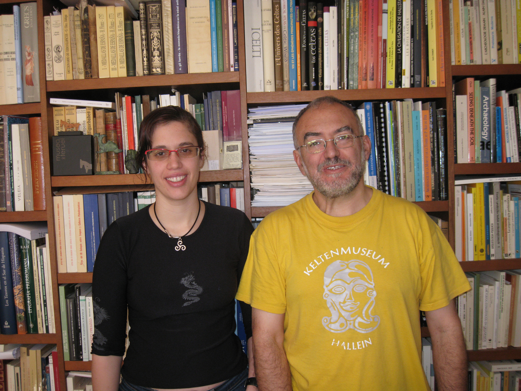 El profesor Francisco Burillo, experto en el estudio de Celtiberia, y su hija María del Pilar Burillo.